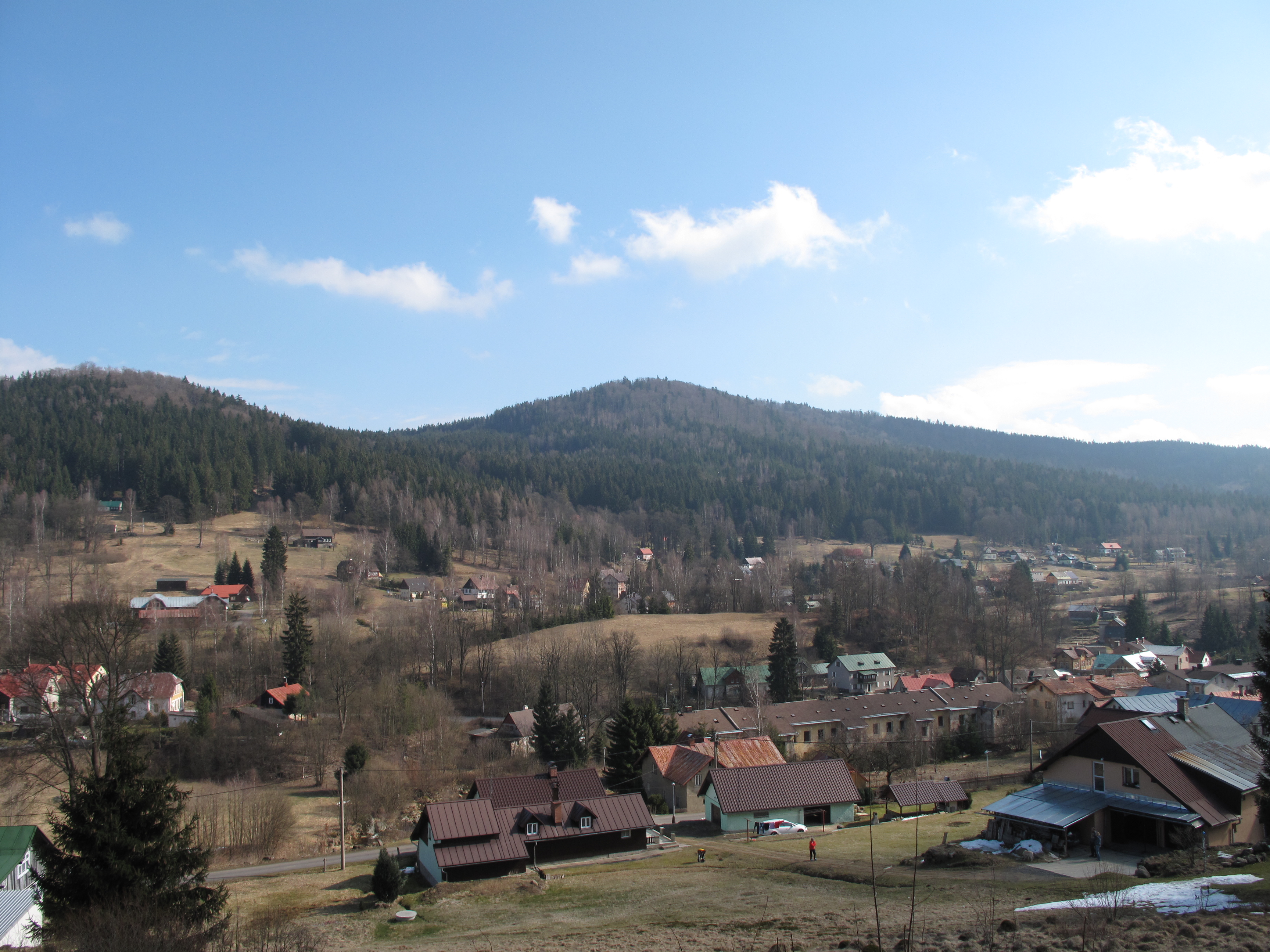 Mariánská hora (874 m) z Dolního Maxova. Okres Jablonec nad Nisou, Česká republika.